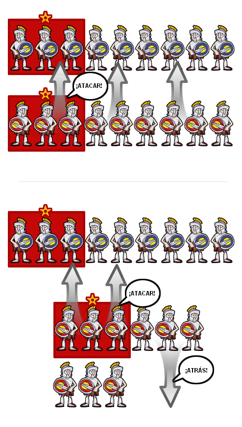 Disposición de los ejércitos en la batalla de Leuctra.